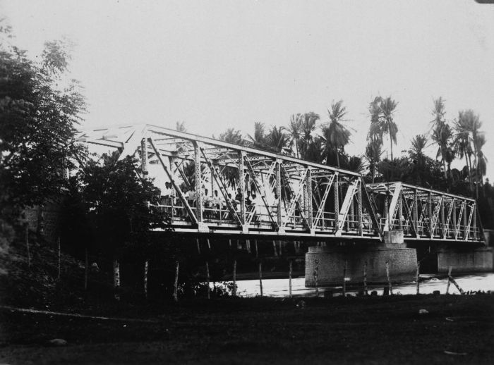 Foto. Brug te Paloe